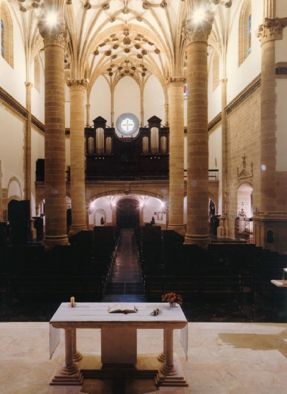 San Andres eliza Eibar